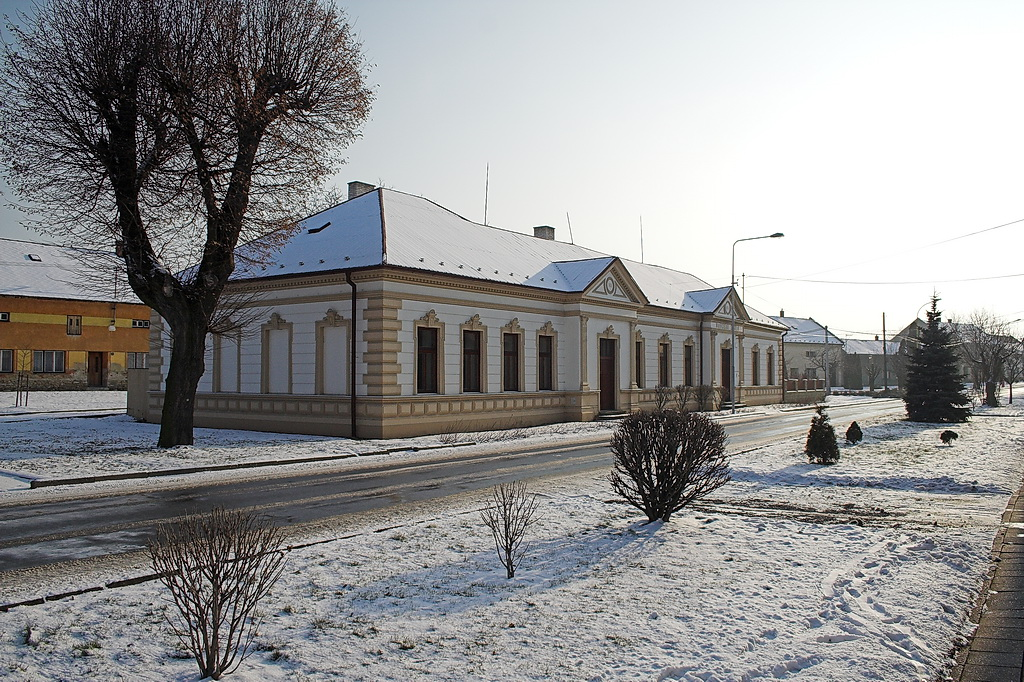 Bývalá obecní škola v Kurovicích